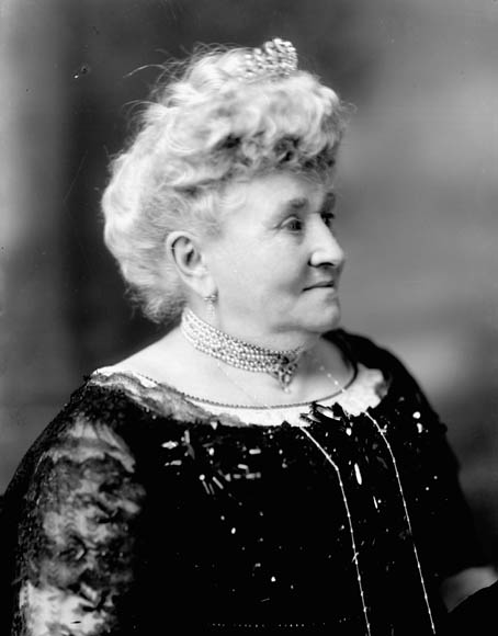 Lady Zoë Laurier (née Lafontaine)